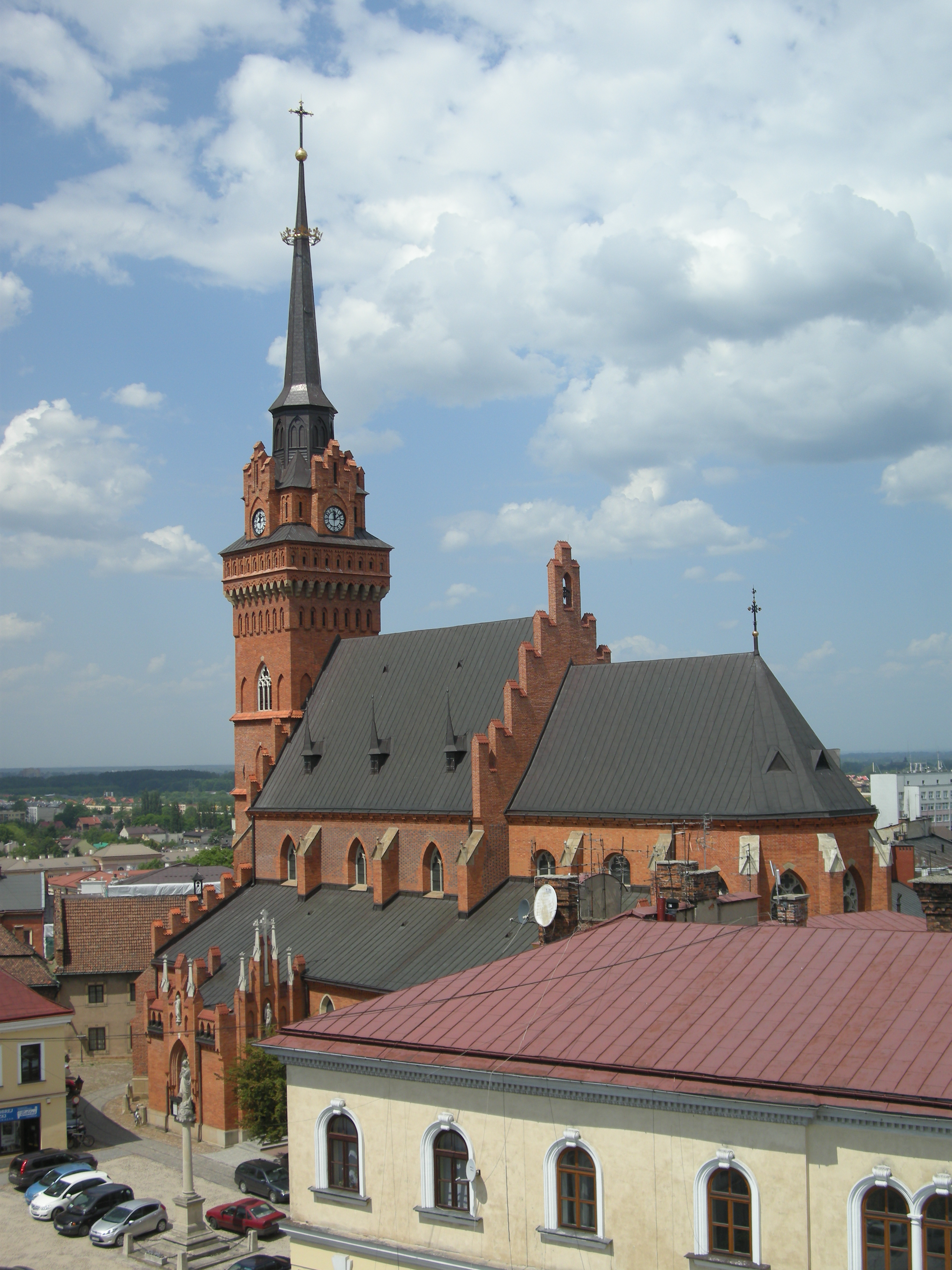 Bazylika katedralna widziana z wieży ratusza